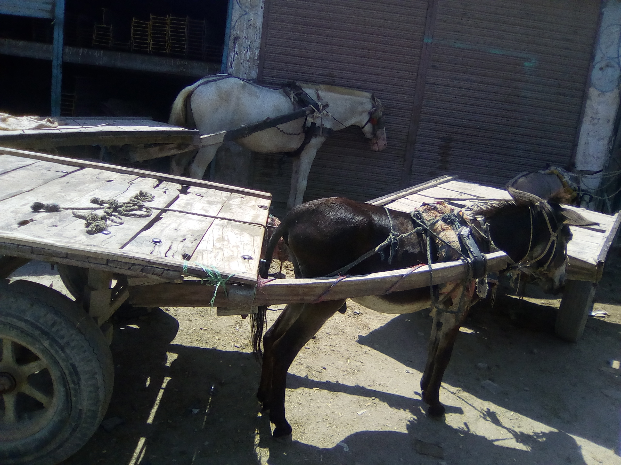 گدھاگاڑی سامان دھونے کے لے اڈا پر کھڑی ہے